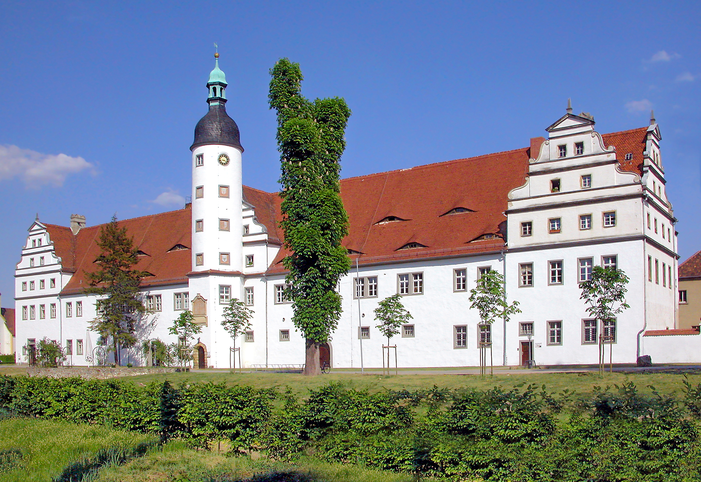 04.05.2007 01561 Zabeltitz, Am Park 6 (GMP: 51.352588,13.495937): Altes Schloß, "Großer Stall". Der sächsische Kurfürst Christian I. baute ab 1588 das vom Oberzeugmeister Paul Buchner geplante, jetzt so genannte Alte Schloss, ein Renaissancebau, als kurfürstliches Stallgebäude sowie zur Unterbringung von Gästen und Gefolge. Kurfürst Christian II. vollendete 1598 die Pläne seines inzwischen verstorbenen Vaters. 1949 zog ein Landambulatorium in das Alte Schloss ein. Heute beherbergt es u.a. Arztpraxen, Wohnungen, Büros u. das Standesamt. [DSCN27851.TIF]20070504450.DR.JPG(c)Blobelt